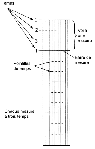 Klavarskribo